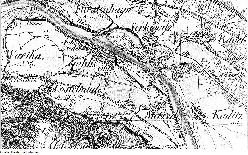 Original image description from the Deutsche Fotothek Dresden-Gohlis. Ausschnitt aus: Oberreit, Sect. Dresden, 1821/22